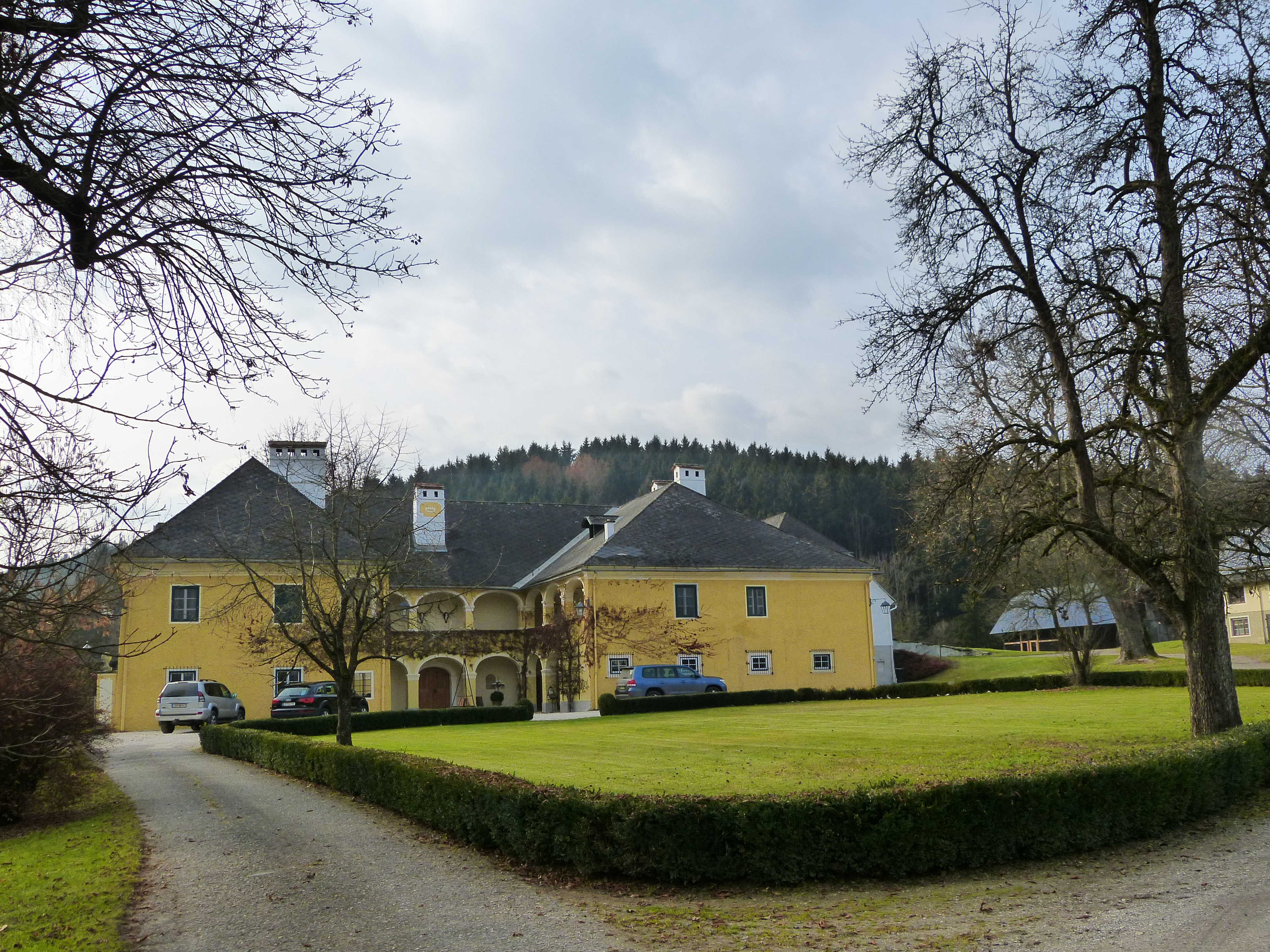 Meierhof Hunnenbrunn: barocker Bau neben Schloss Hunnenbrunn; Gemeinde Frauenstein, Kärnten): Ansicht von Nordosten